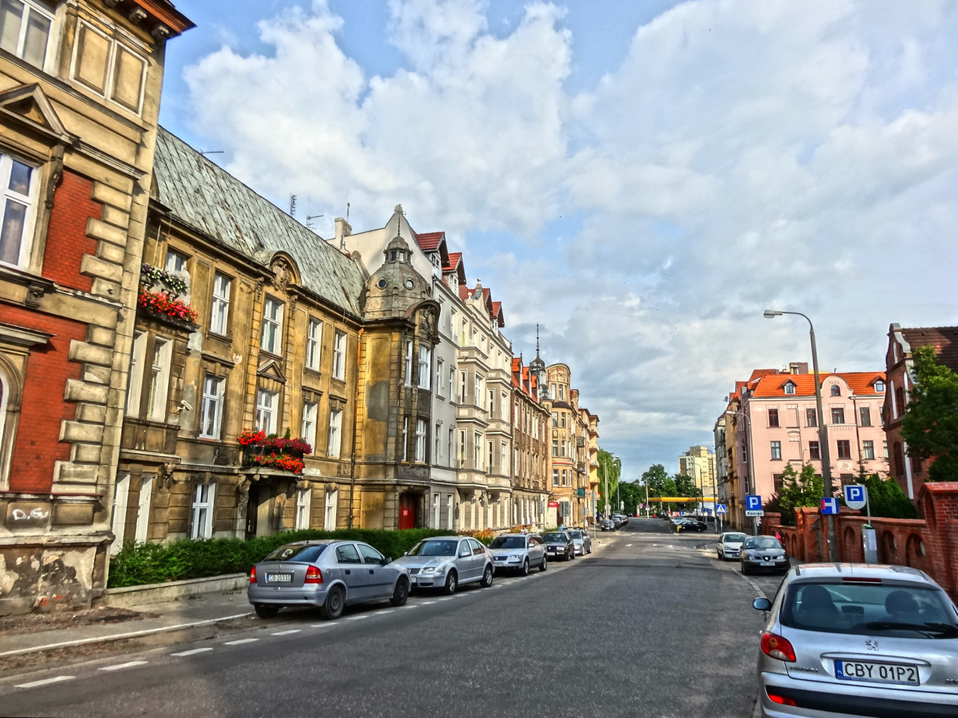 Ulica Świętej Trójcy w Bydgoszczy